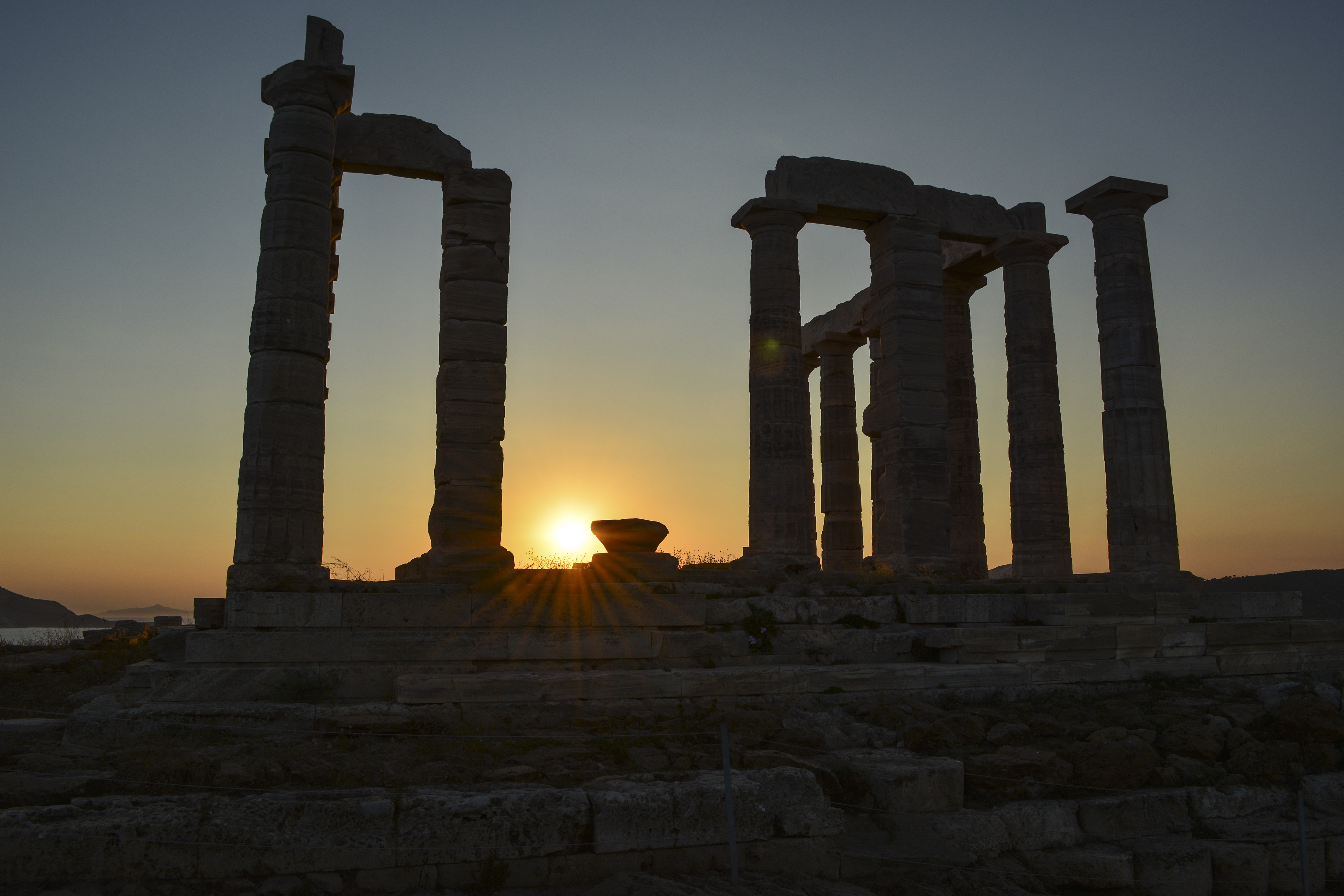 Ο Ναός του Ποσειδώνα στο Σούνιο στο νοτιότερο άκρο του νομού Αττικής This is a photography of Natura 2000 protected area with ID GR3000005